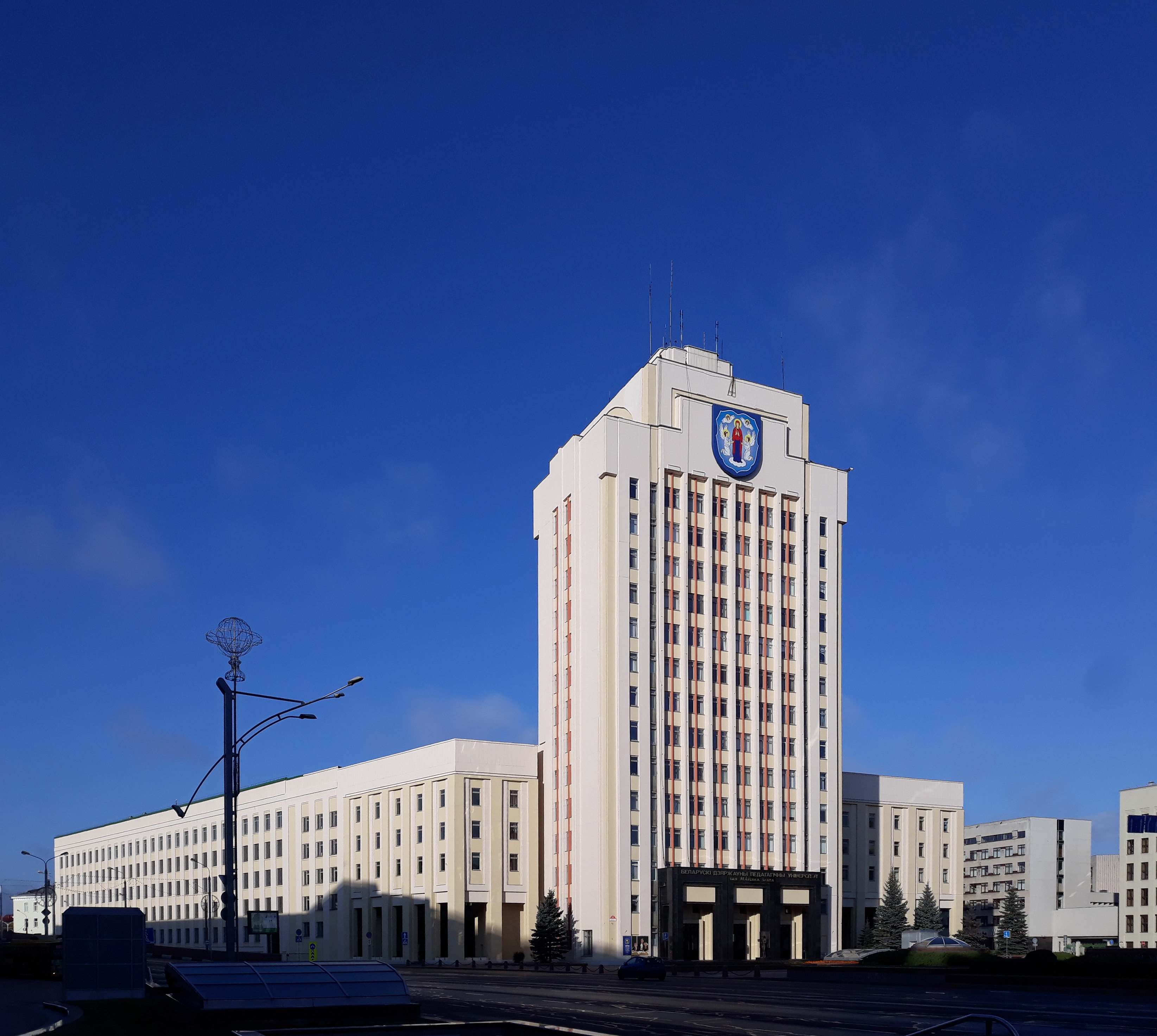 БДПУ імя М. Танка